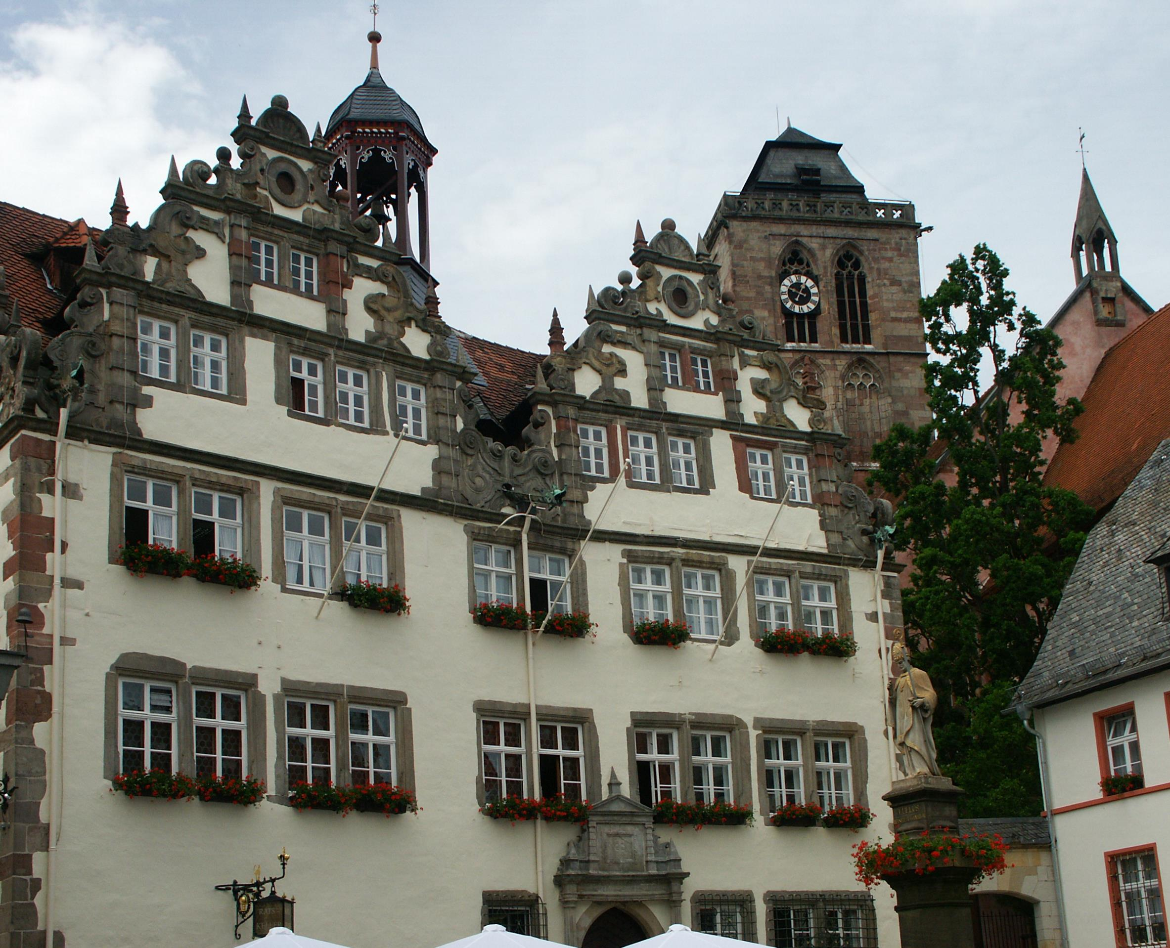 Rathaus von Bad Hersfeld, im Hintergrund die Stadtkirche